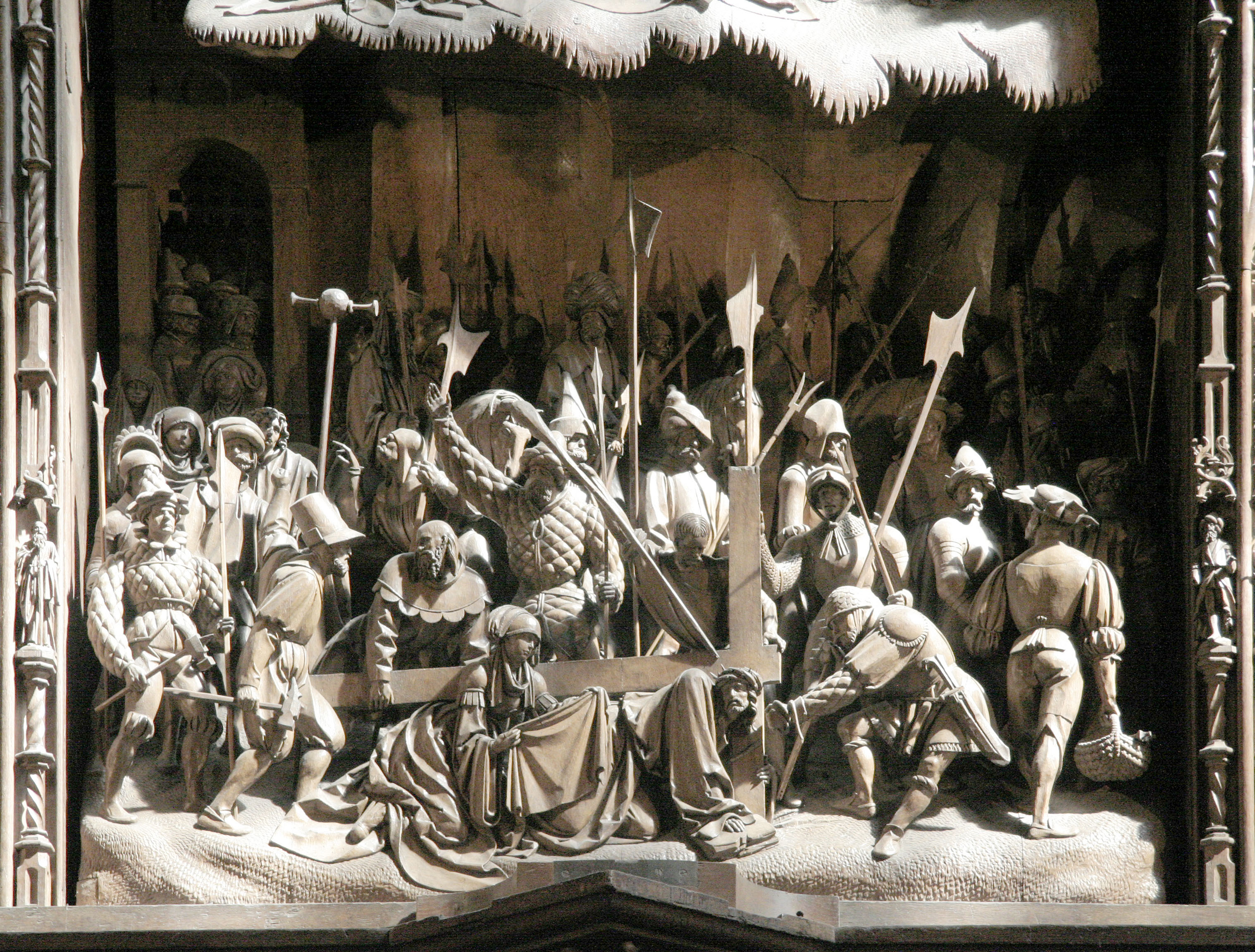 Ausschnitt des Bordesholmer Altars, Kreuztragungs-Szene